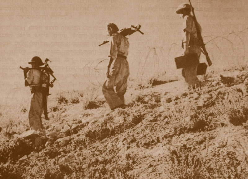 לוחמי הגדוד הראשון של הפלמ"ח בקרב משמר העמק, אפריל 1948 ארכיון ההגנה